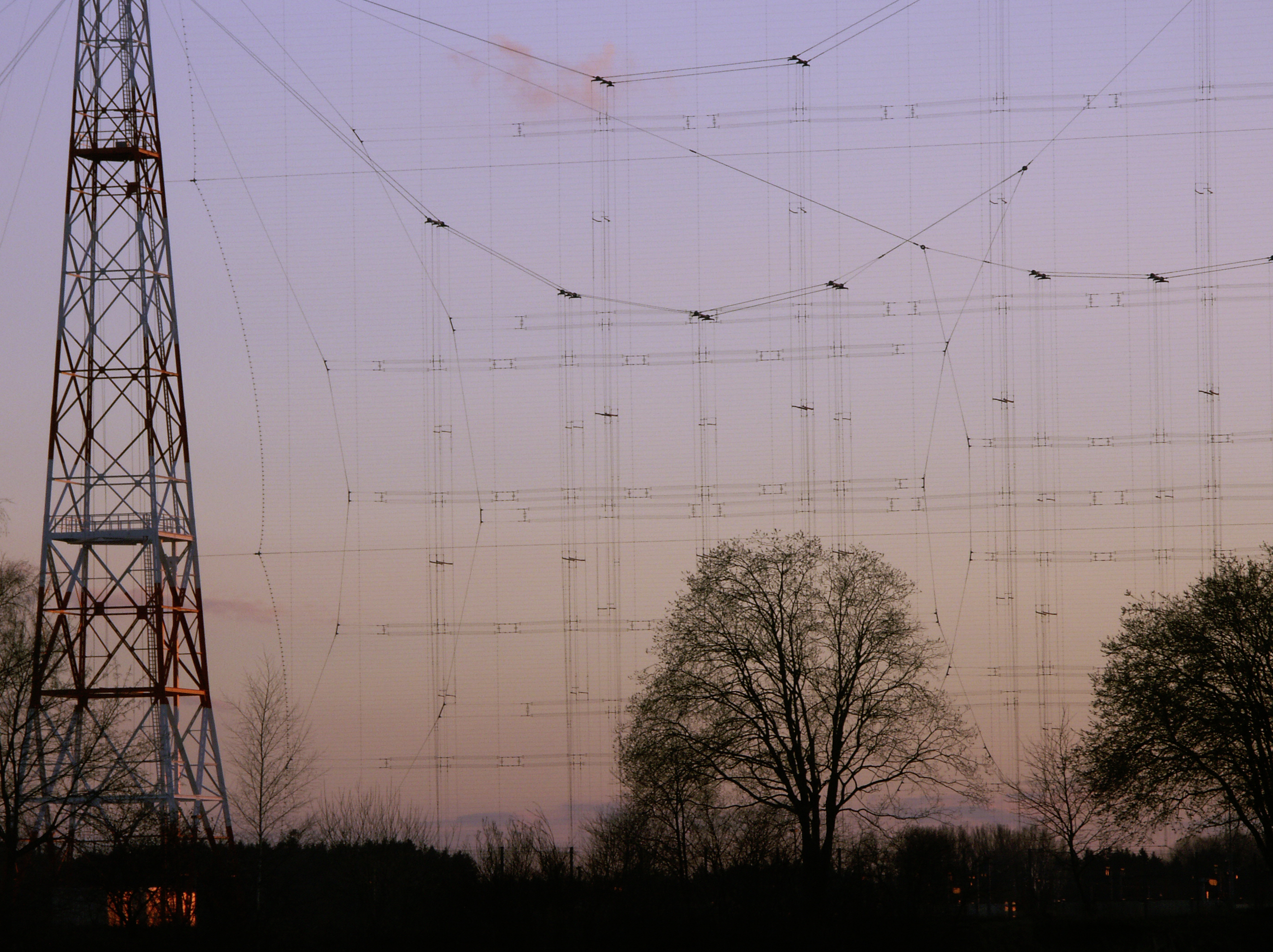 Kurzwellensendeanlage Wertachtal